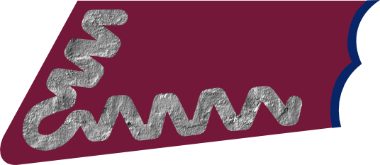 Łapka wojsk łączności na kołnierz kurtki w latach 1949 -1952